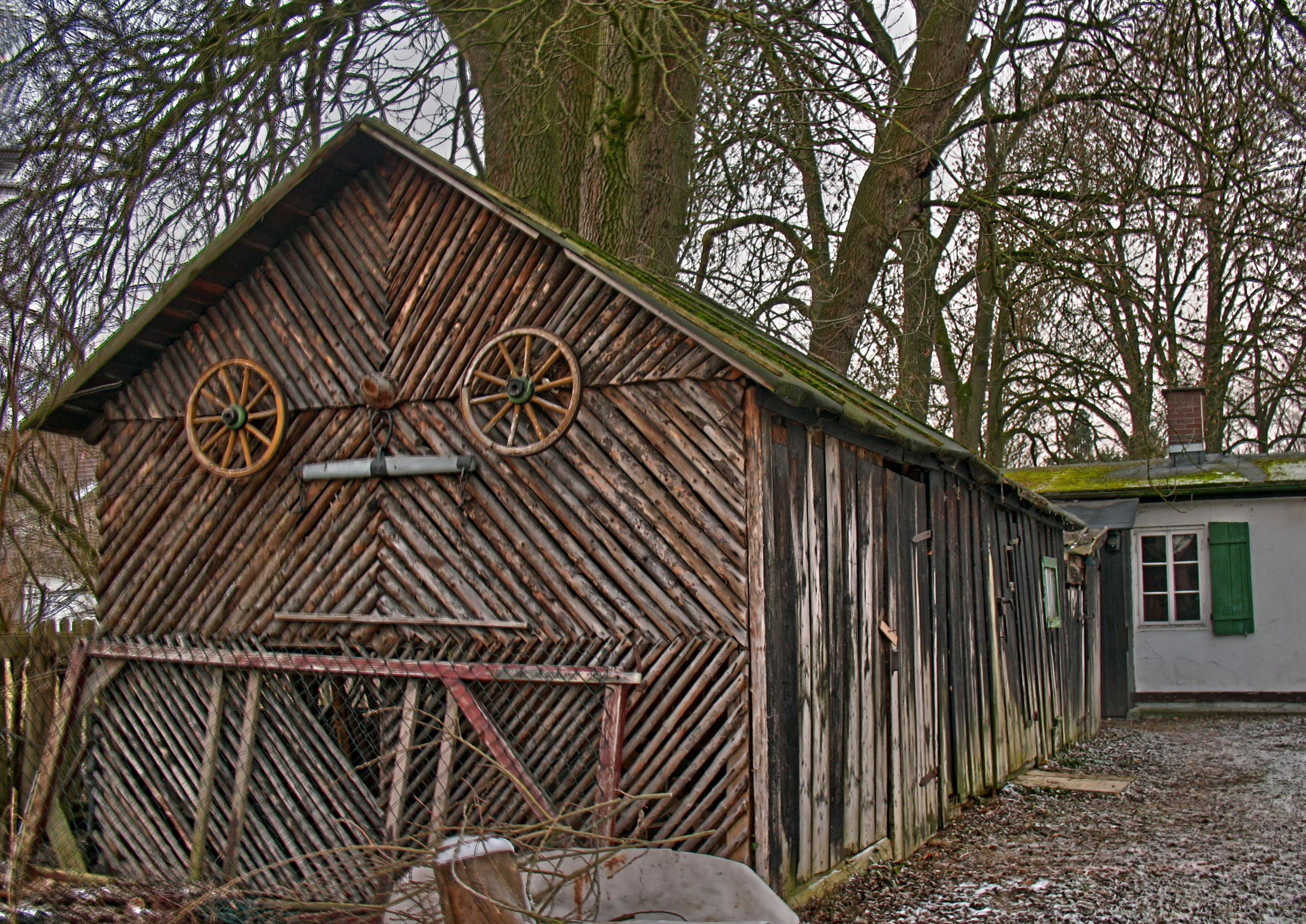 Deutschland, Bayern, Fürstenfeldbruck, Olching, Schuppen an der Amper